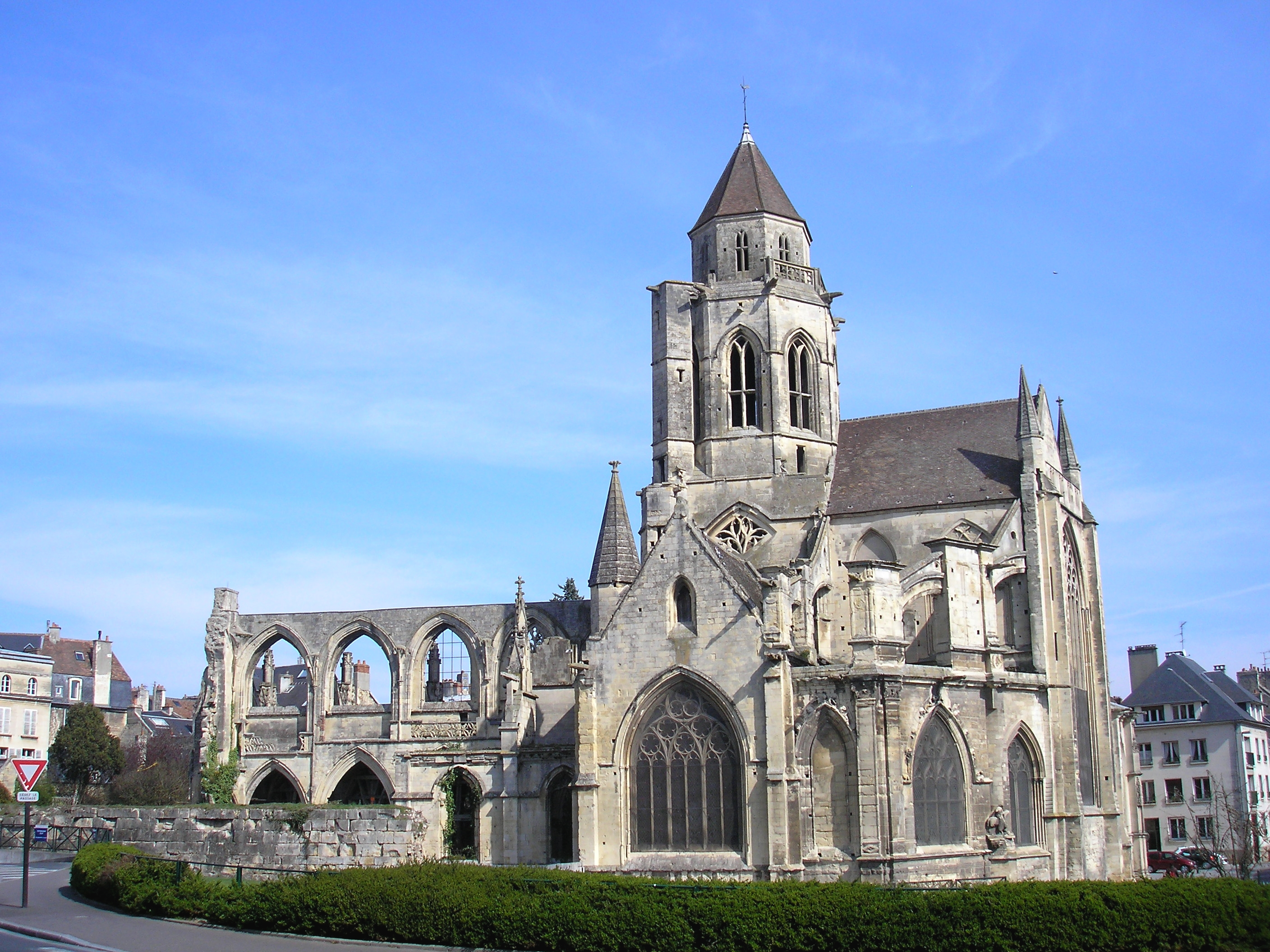 Caen (Normandie, France). L'église Saint-Étienne-le-Vieux.